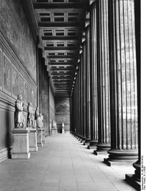 Berlin; Vorhalle des Alten Museums am Lustgarten